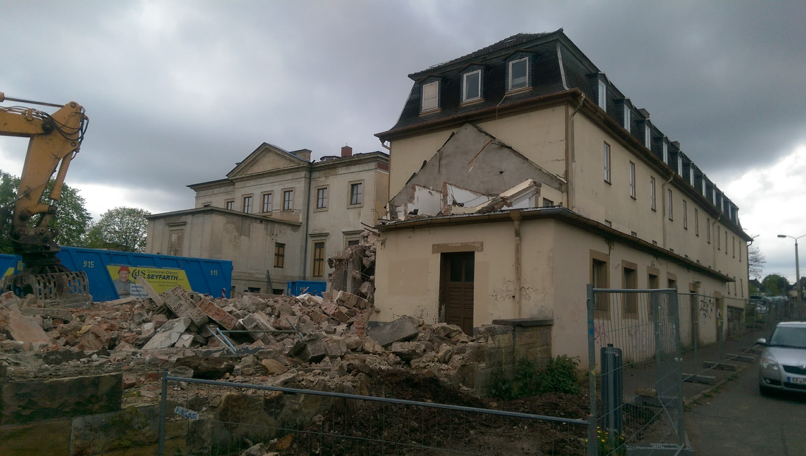 Abbruch Kavaliershaus Gotha